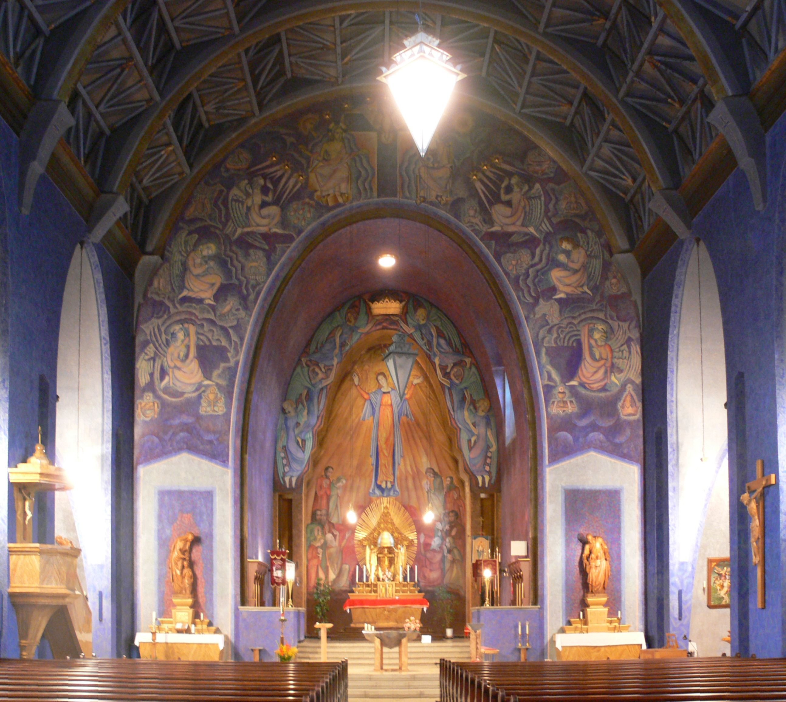 Baienfurt, Landkreis Ravensburg Katholische Pfarrkirche Mariä Himmelfahrt